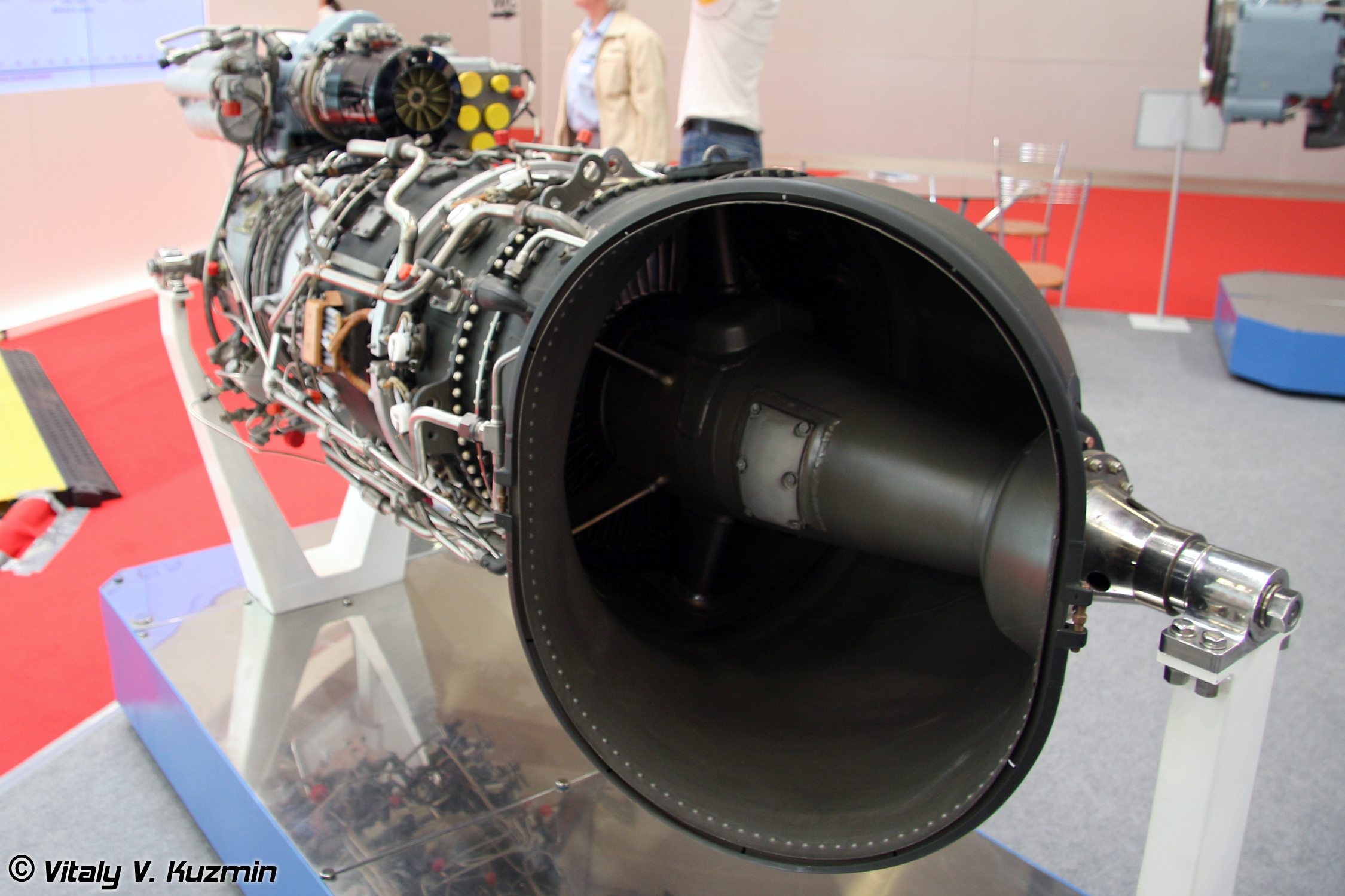 Турбовальный двигатель МС-14ВМ для Ми-8Т (Turboshaft engine MS-14VM for Mi-8T)